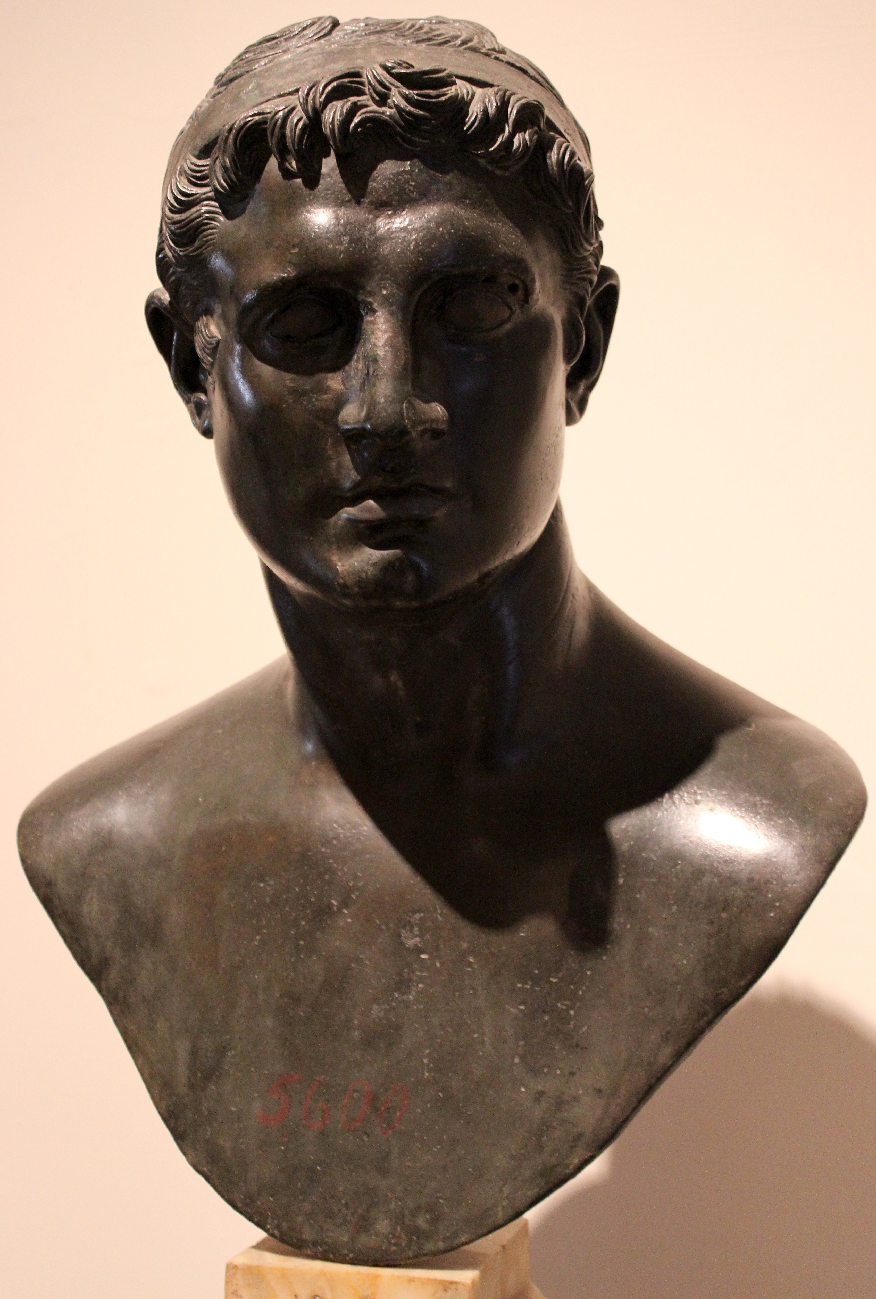 Nápoles. Museo Archeologico Nazionale (inv. 5600). Ptolomeo Lathyro. Estatua procedente de la Villa dei papiri en Herculano.